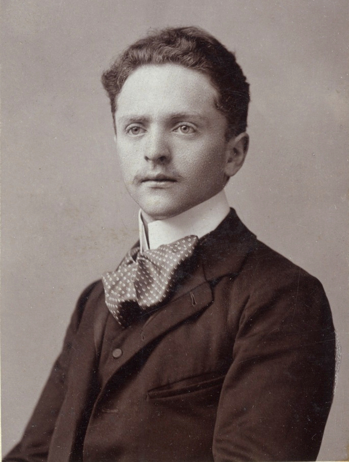 Balázs Béla magyar költő, író, filmesztéta, filmrendező, filmfőiskolai tanár.